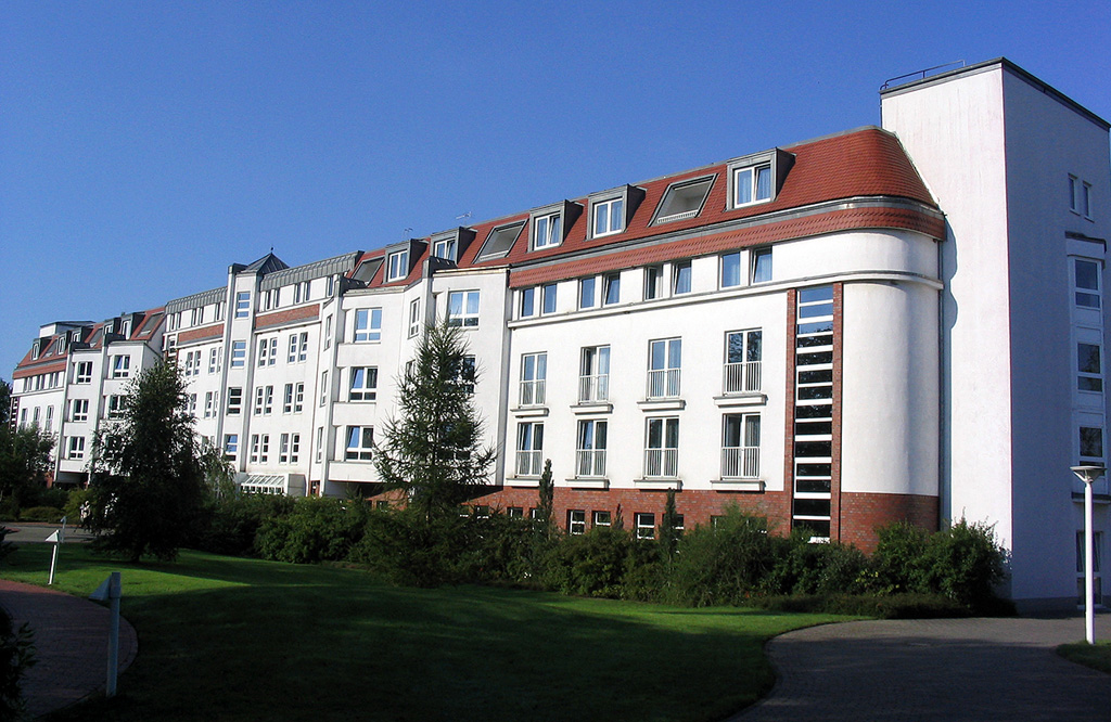 Rehaklinik / Medianklinik in Bad Sülze